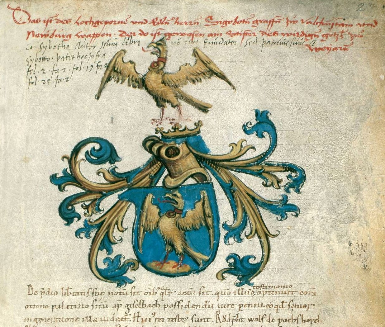 Wappen der Falkenstein im Codex Falkensteinensis - BayHStA KL Weyarn 1, Herrenchiemsee, 1166